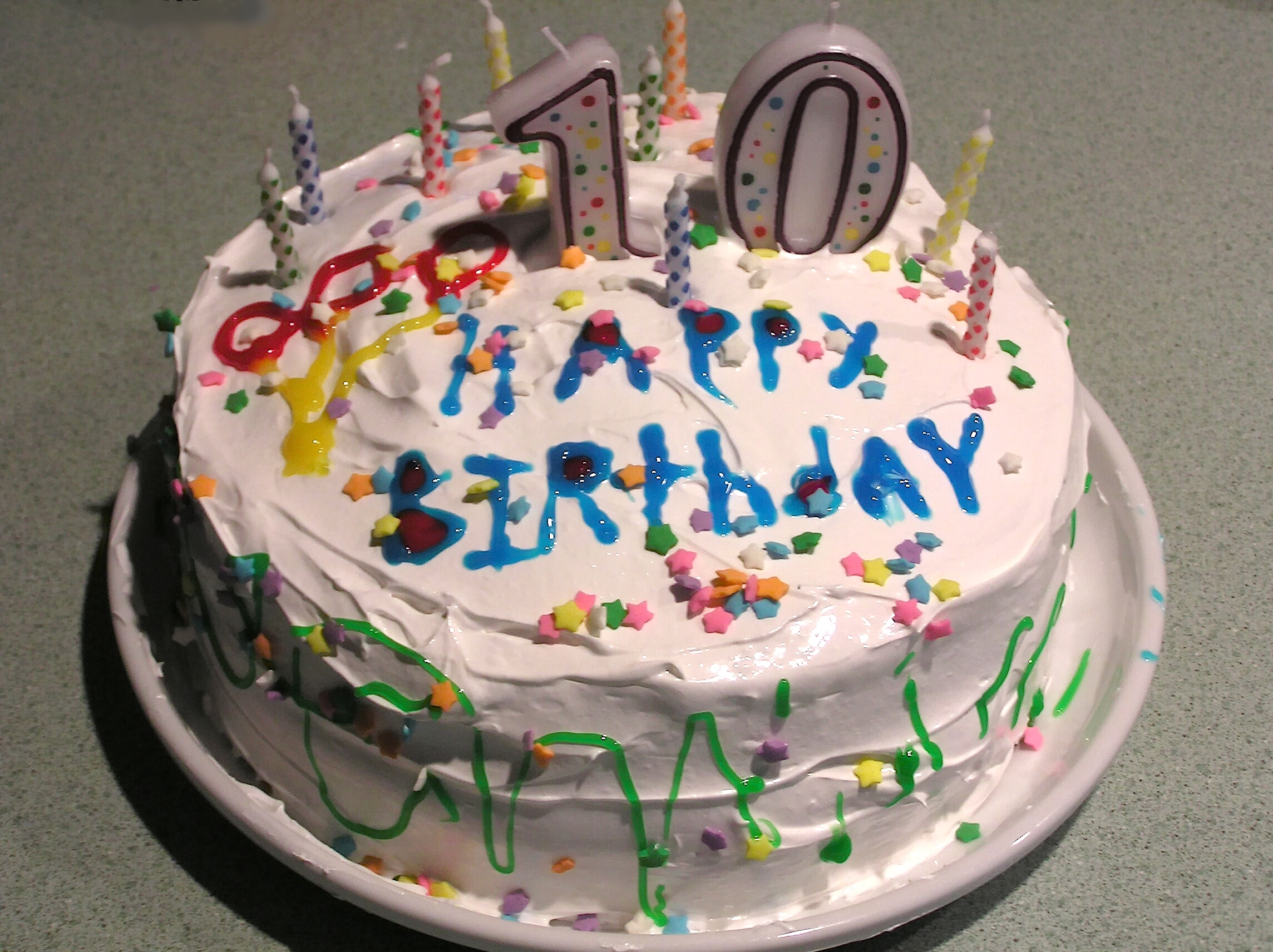 Geburtstagstorte zu einem 10-jährigen Geburtstag, garniert unter anderem mit Aufschrift aus buntem Zuckerguss, Kerzen und bunten Zuckerplättchen in Sternform.